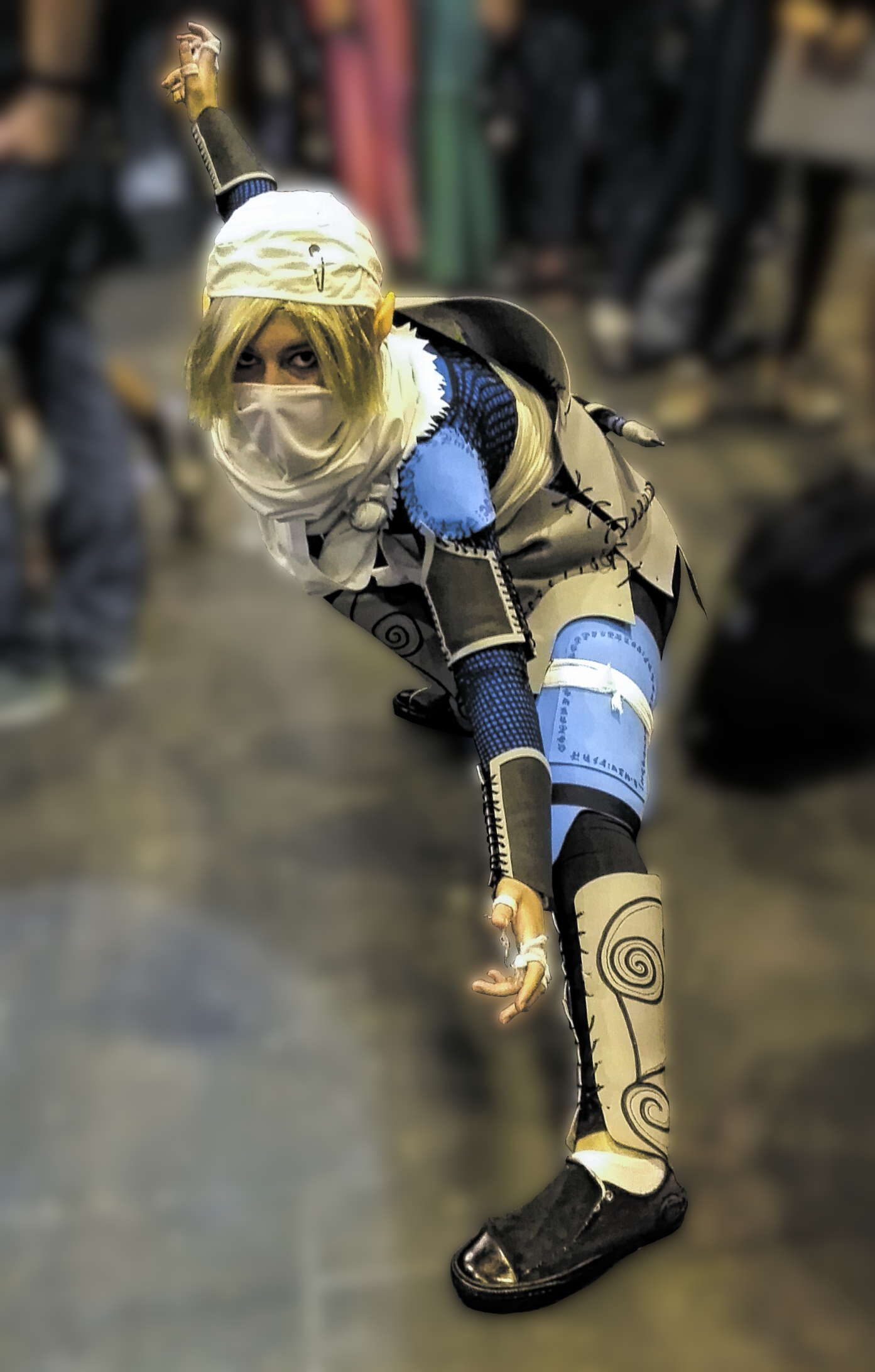 Cosplay de Sheik en la Japan Weekend de Madrid en 2017